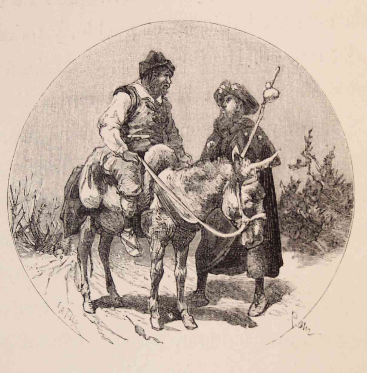 "Don Quixote" — Edición anotada por Nicolás Díaz de Benjumea e ilustrada por Ricardo Balaca (1880-1883). 202_254_quijote_cap54